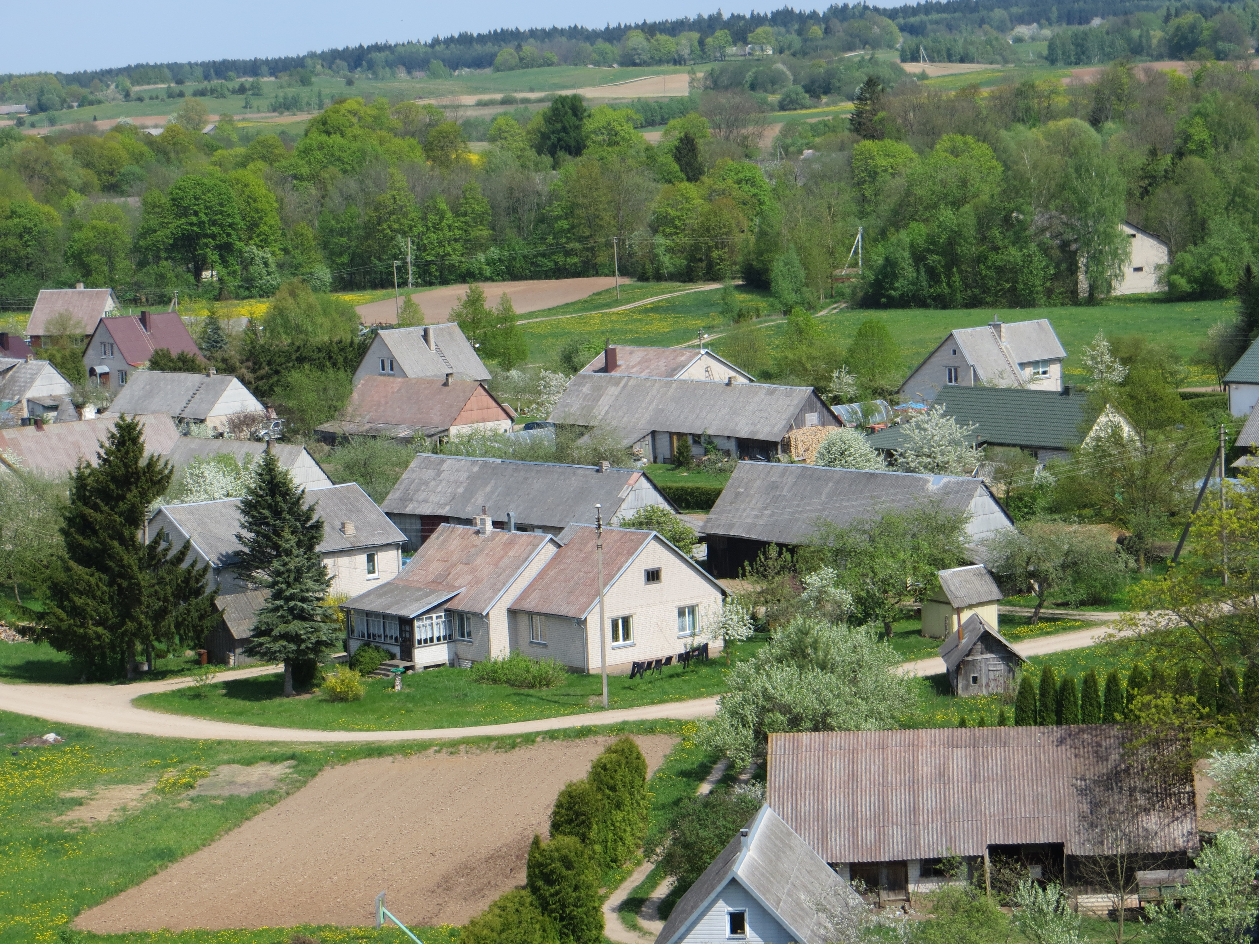 Šlavėnai, Lithuania